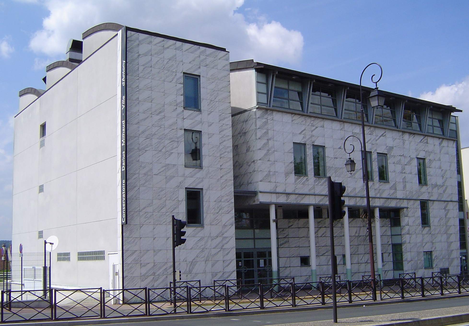 Antony